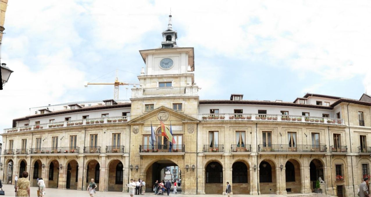 Ayuntamiento de Oviedo, Asturias.